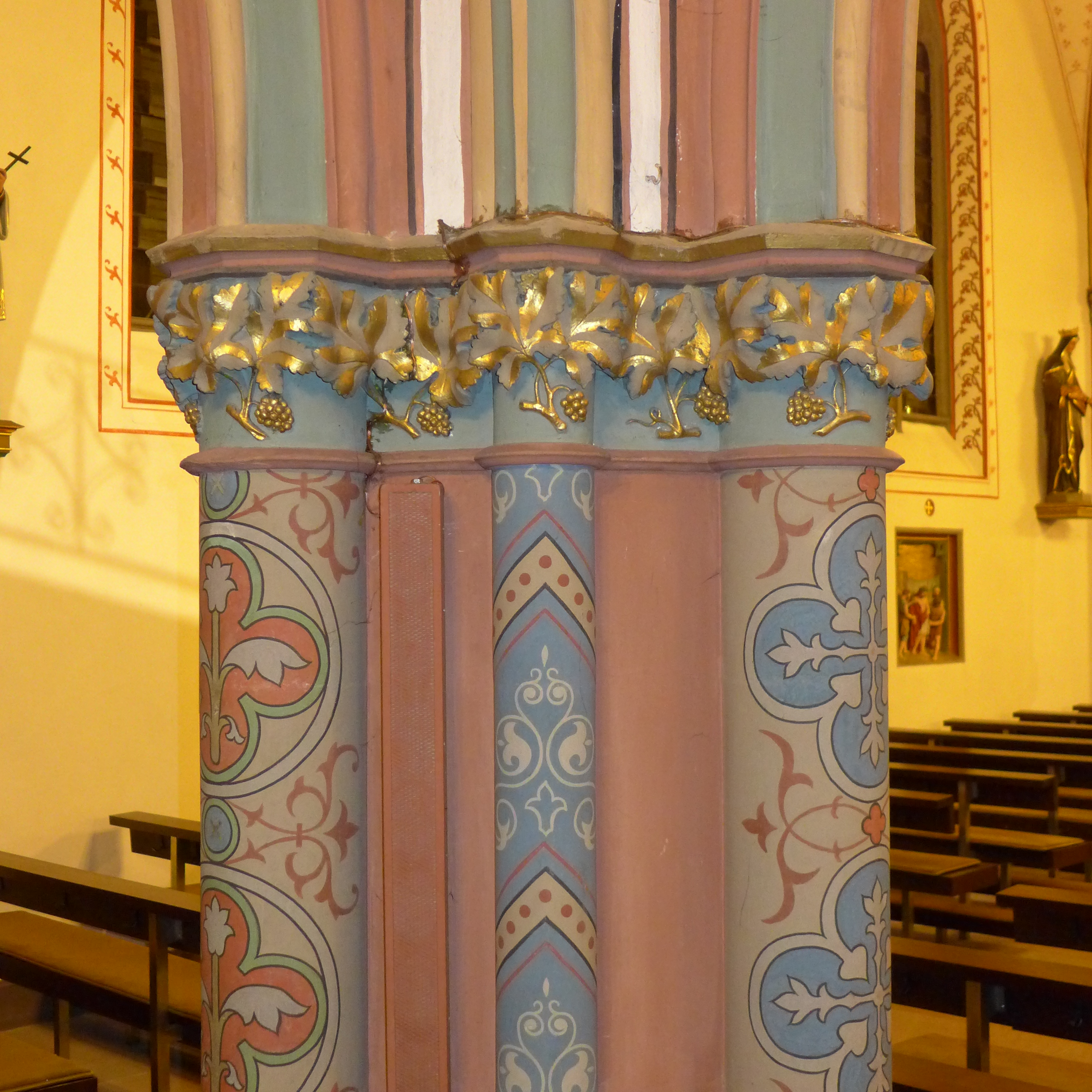 St. Katharina (Wallerfangen), Pfeilerkapitell